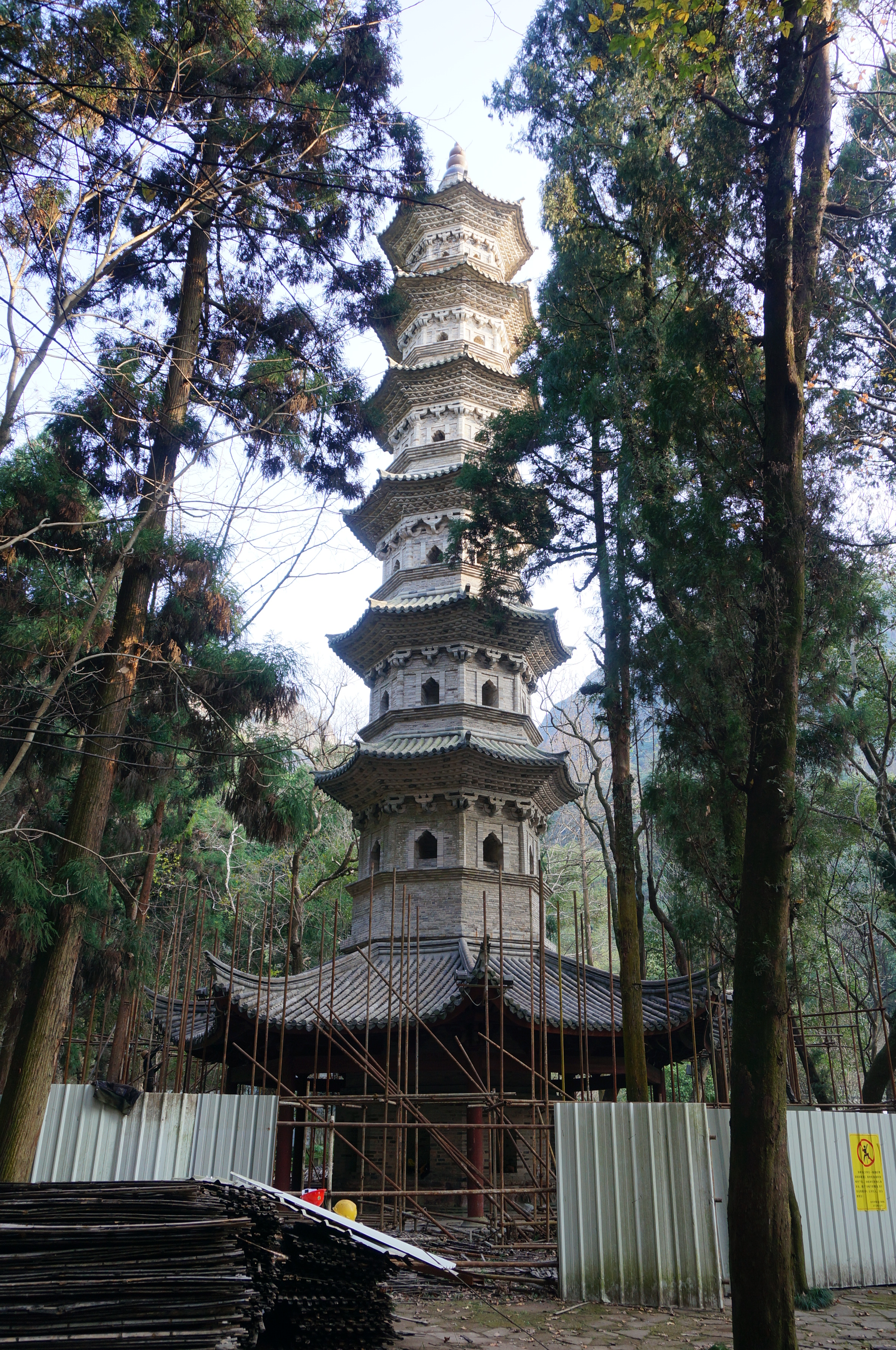 台州市黄岩区瑞隆感应塔，西面。